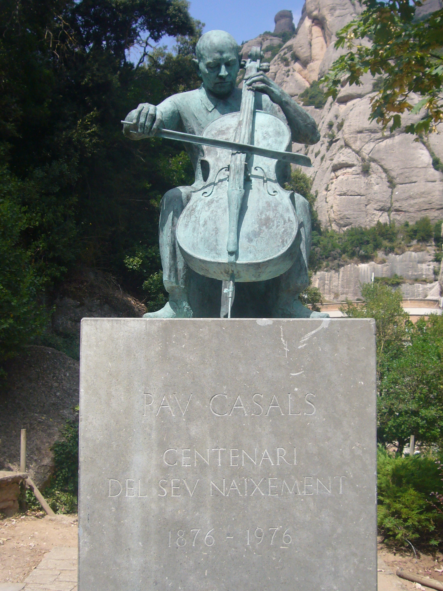 Cebuano: Centenari del naixement de Pau Casals 1876-1976. (camí de Sant Miquel - Montserrat)